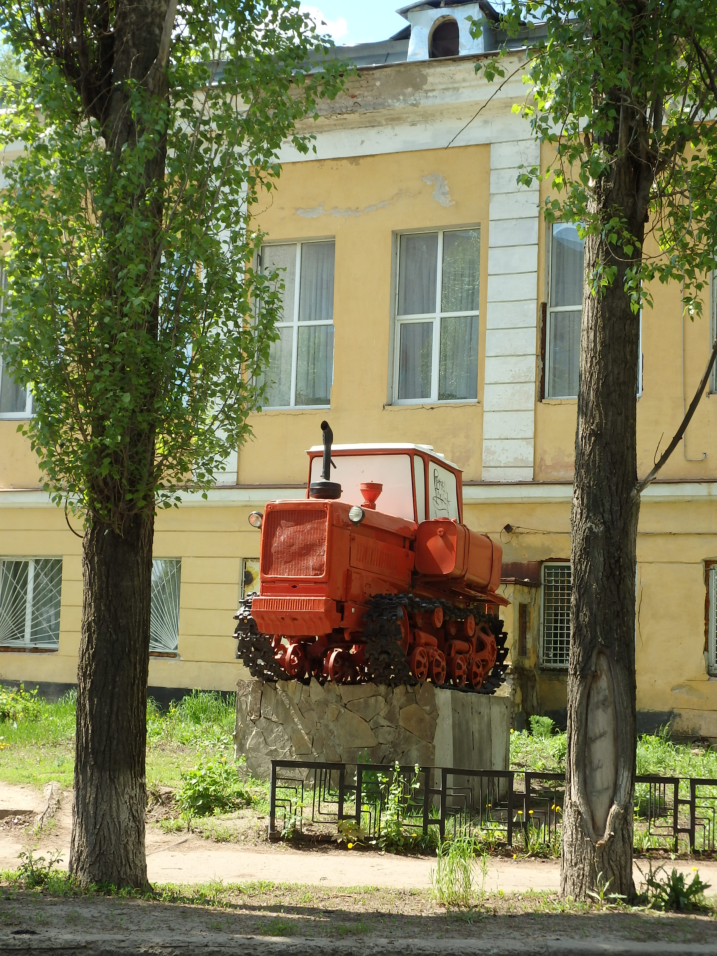 Общежитие студентов со столовой: улица Дарвина, 16, Воронеж, Воронежская область